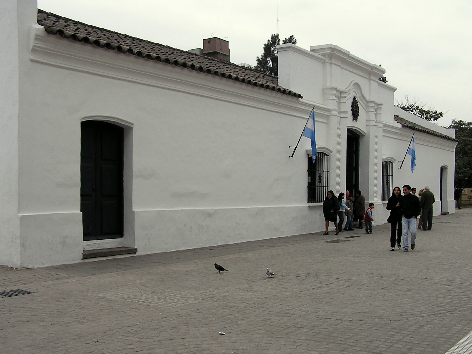 Vista general de la Casa de Tucumán